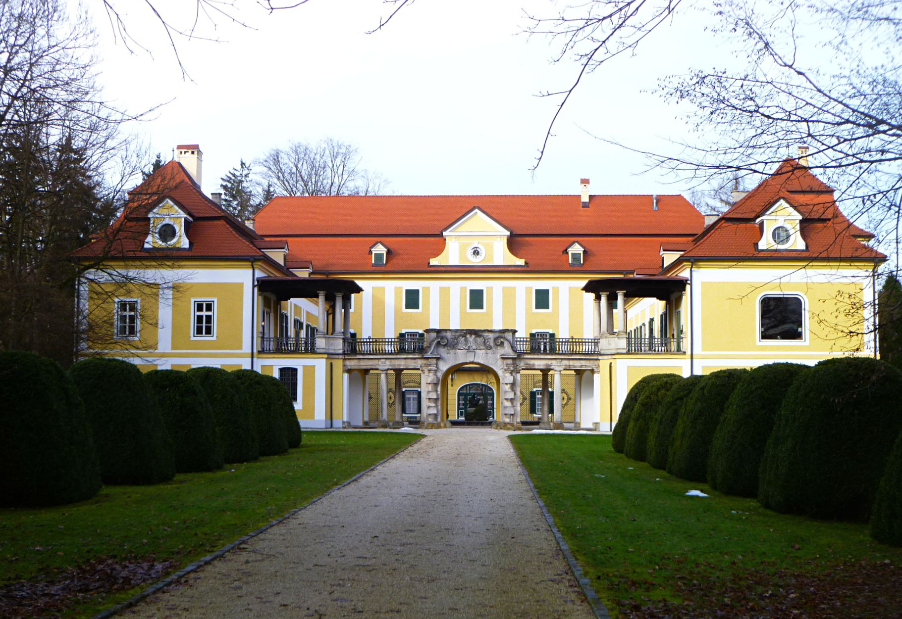 Schloss Kogl in St. Georgen im Attergau, Ansicht von Südosten